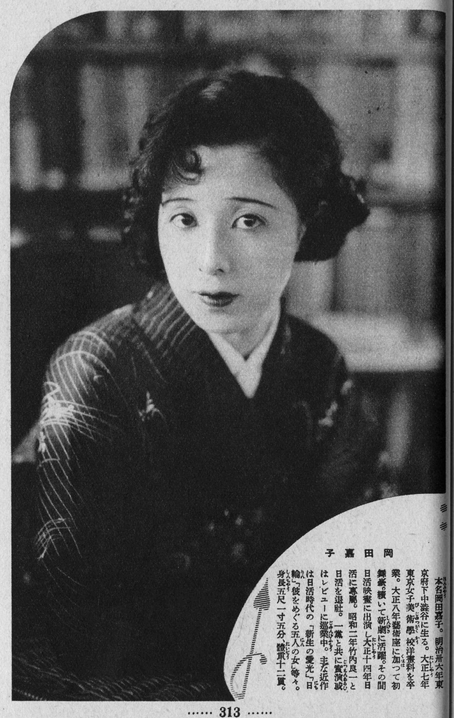 岡田嘉子：＜＜画像中の説明は必ずしも正しいとは限らない＞＞・・・「本名岡田嘉子。明治三十六年東京府下中渋谷に生る。大正七年東京女子美術学校洋画科を卒業。大正八年芸術座に加って初舞台。続いて新劇に活躍。その間日活映画に出演し大正十四年日活に専属。昭和二年竹内良一と日活を退社。一党と共に実演或はレビユーに巡業中。主な近作は日活時代の『新生の愛光』『日輪』『彼をめぐる五人の女』等々。身長五尺一寸五分、体重十二貫。」